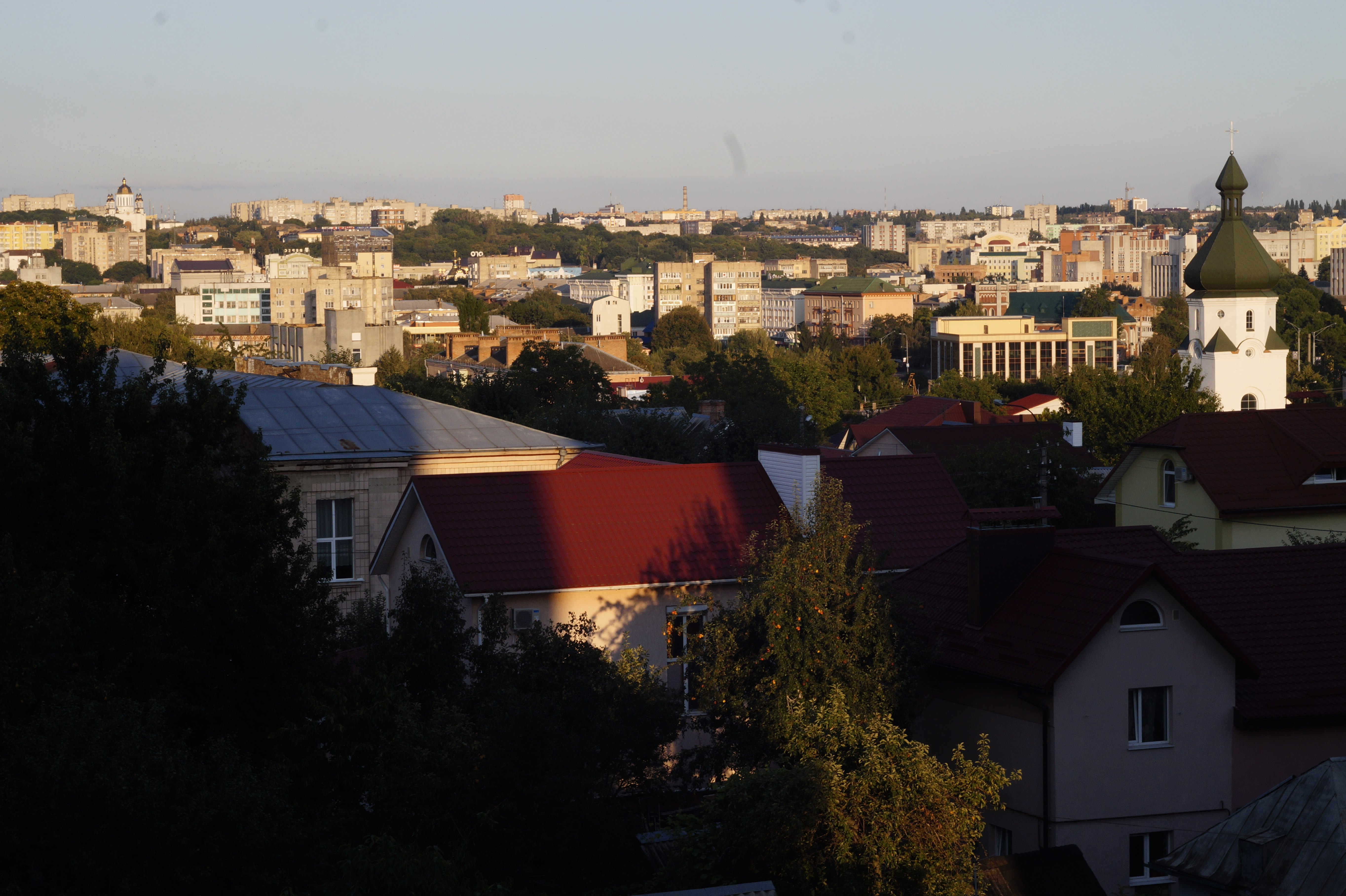 Центральна частина